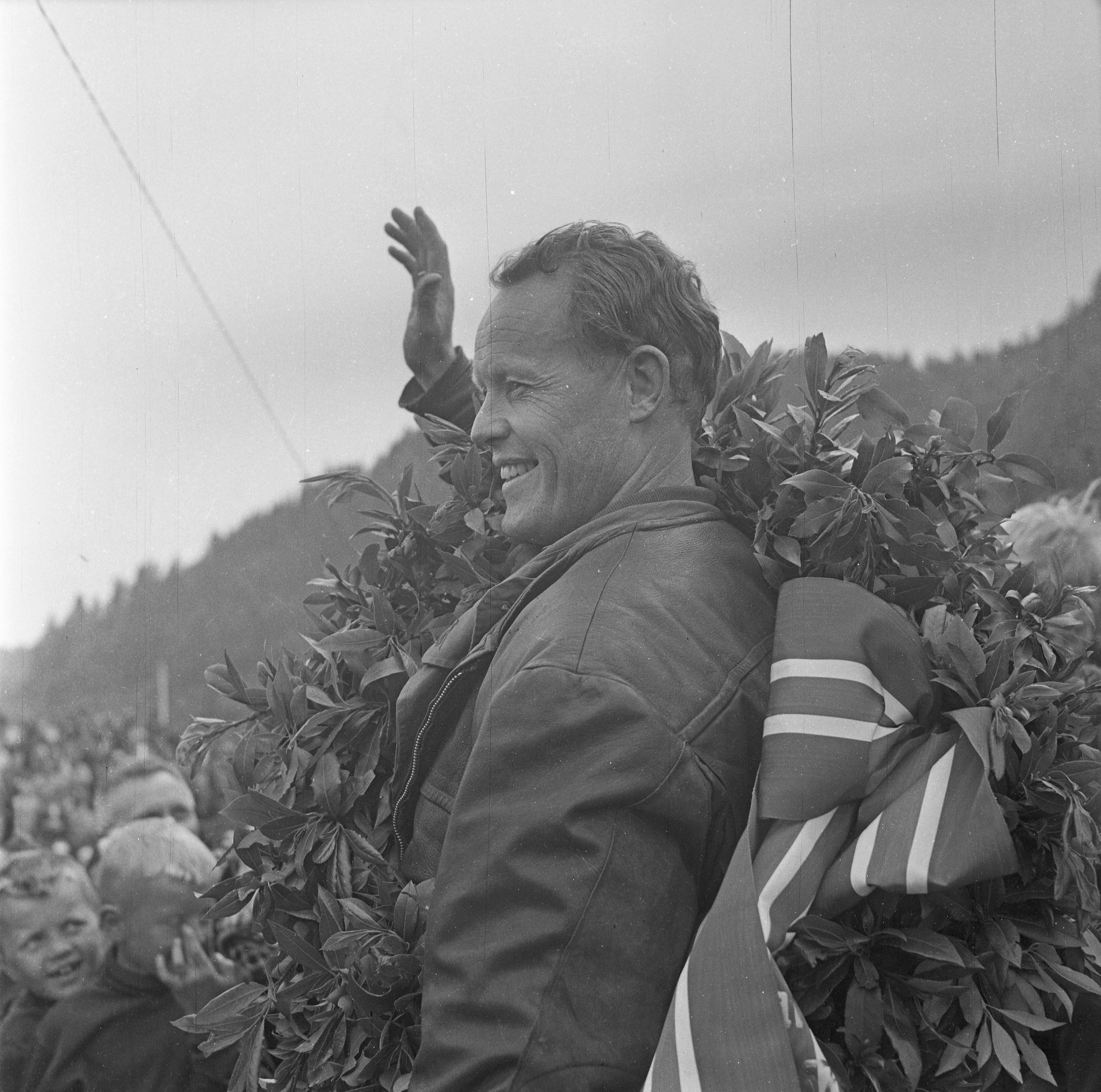 Format: Negativ 120 film Dato / Date: 8 Juli 1967 Fotograf / Photographer: Eirik Sundvor (1902 - 1992) Sted / Place: Ulven ved Bergen Wikipedia: Thormod Næs (1930 - 1997) Wikipedia: Skytterkonge Lenke / Link: Det frivillige Skyttervesen (dfs.no) Eier / Owner Institution: Trondheim byarkiv, The Municipal Archives of Trondheim Arkivreferanse / Archive reference: Tor.H43.Bxx.F14355 Merknad: Thormod Næs fra Skjold i Rogaland ble skytterkonge to ganger: første gang i Oslo i 1964, og andre gang i Ulven i 1967. Han konkurrerte også i de Olympiske sommerleker i Tokyo, Japan 1964.